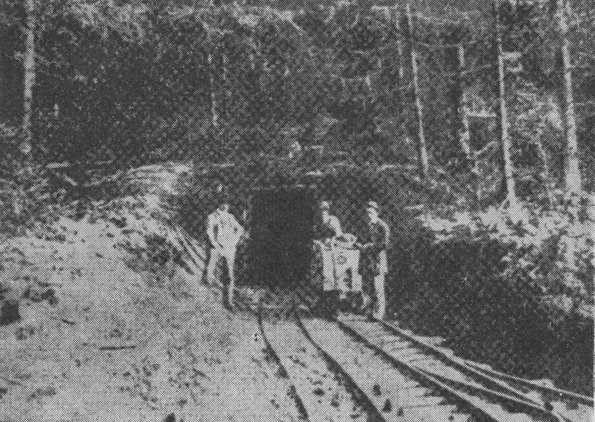 Intrarea în mina de cărbuni „Joseph Rotter” din Comănești, aproximativ 1900.